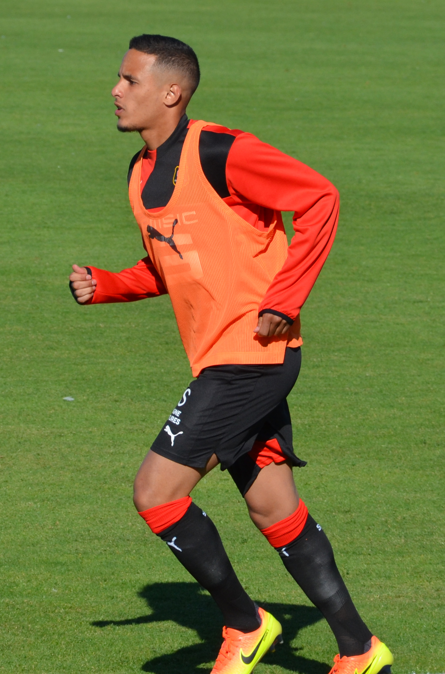 Photographie prise lors du match opposant le Stade rennais à l'USM Alger en match amical au stade Paul-Audrin de Dinard le 16 juillet 2016. Ici, Mehdi Zeffane.